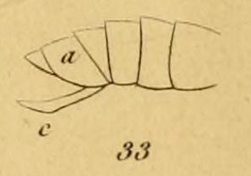 33. Arocatus ♀